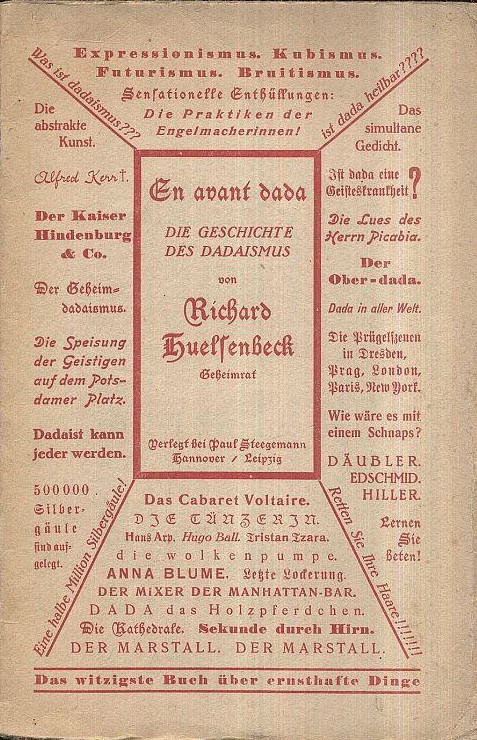 Richard Hülsenbeck: En avant Dada. Die Geschichte des Dadaismus. Paul Steegemann Verlag, Hannover, 1920, Erste Ausgabe (Die Silbergäule. Band 50-51)